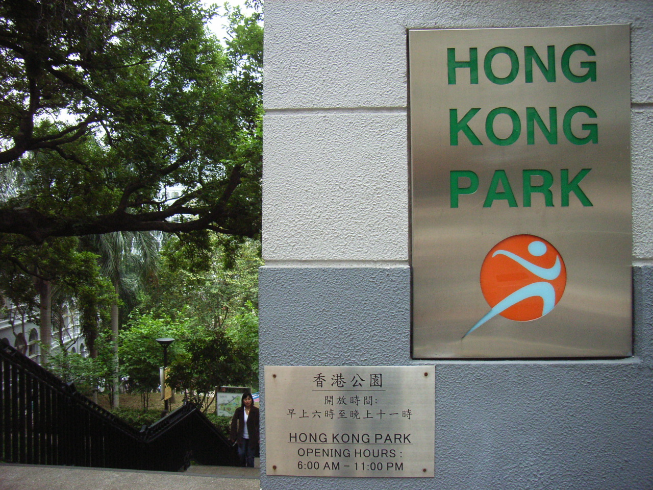 Hong Kong Park, 香港公園 的開放時間